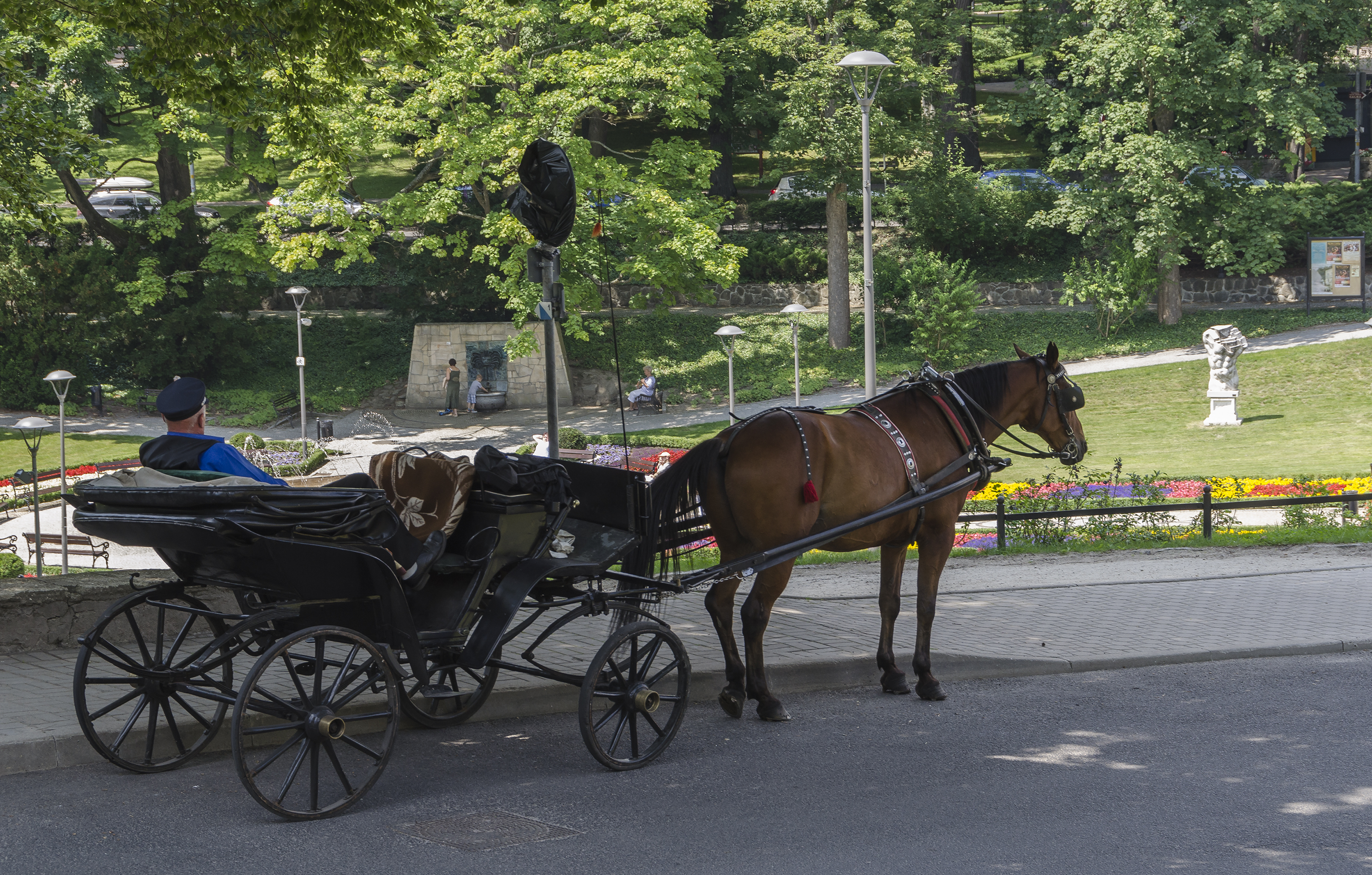 Fiakr w Lądku-Zdroju